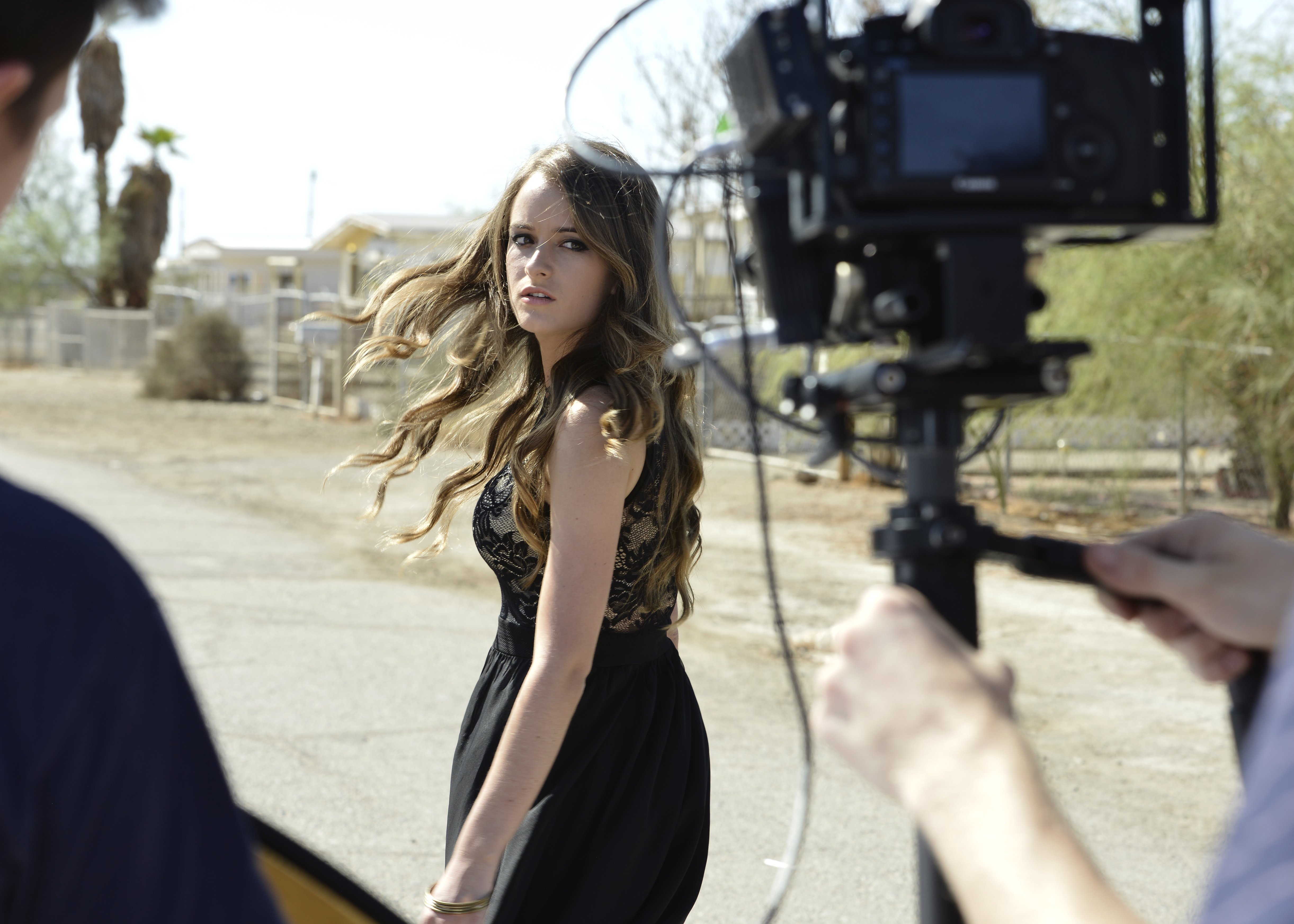 Locación: Bombay Beach, CA Fotógrafo: Lucho Zelaya